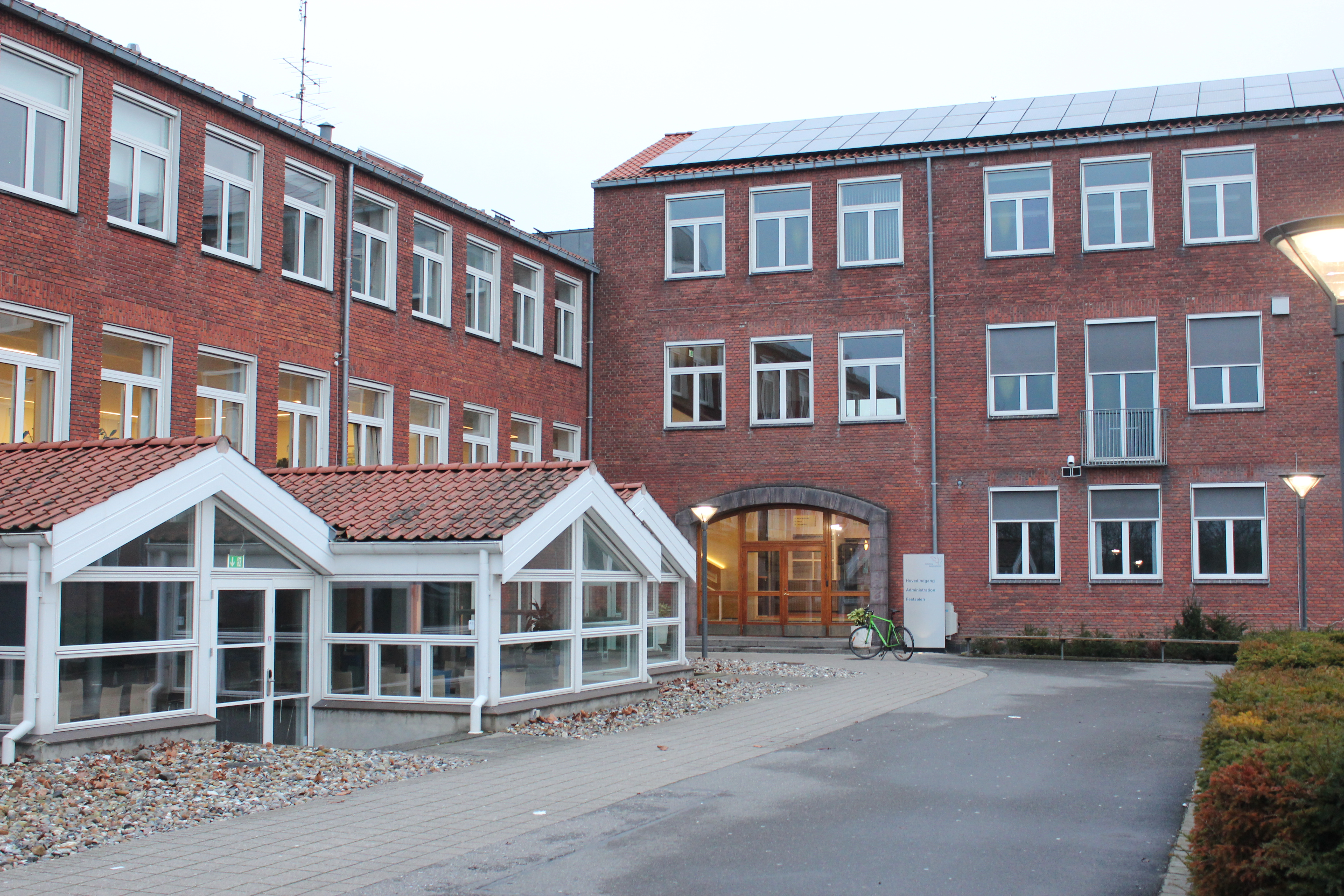 Nykøbing Falsters ældste skole og eneste STX.